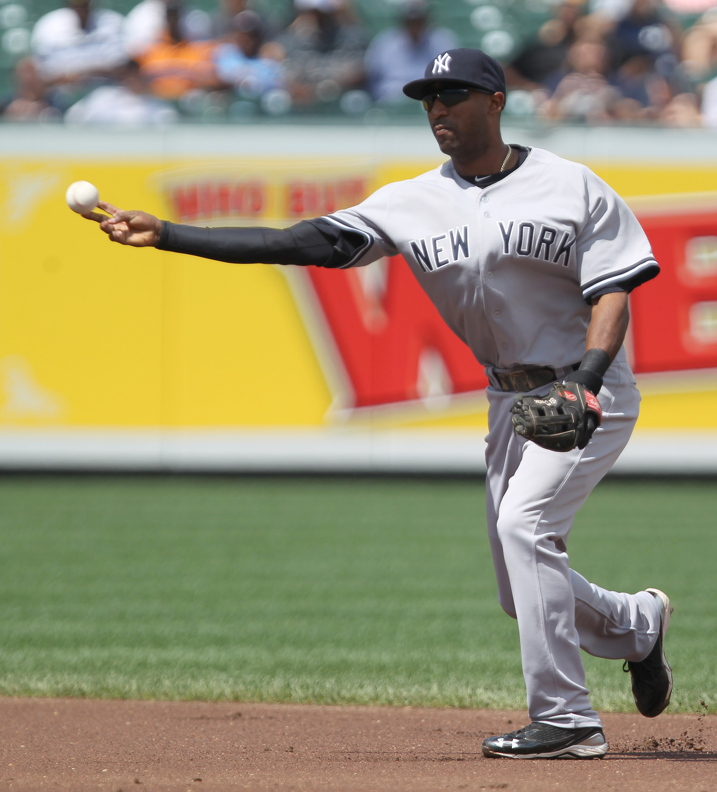 Yankees at Orioles August 28, 2011